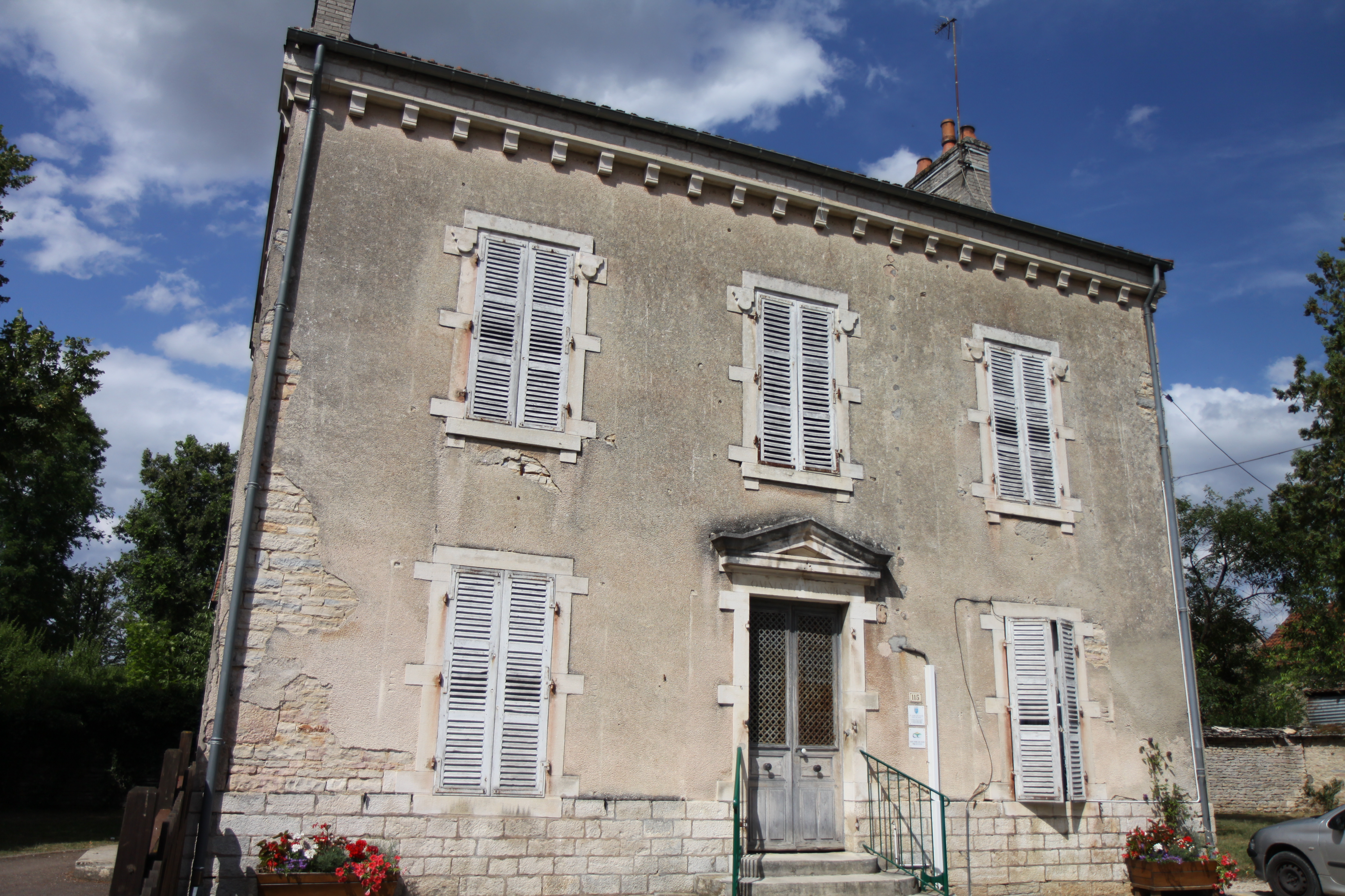 Ancienne mairie de Sainte Marie sur Ouche.